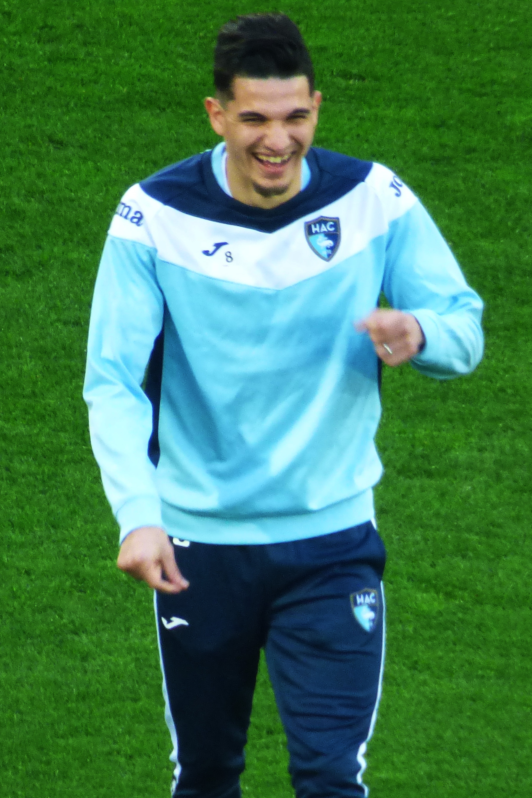 Zinedine Ferhat avant le match Lens / Le Havre, comptant pour la 30ème journée du championnat de France de Ligue 2 2018-2019, le 1er avril 2019 au Stade Bollaert-Delelis.